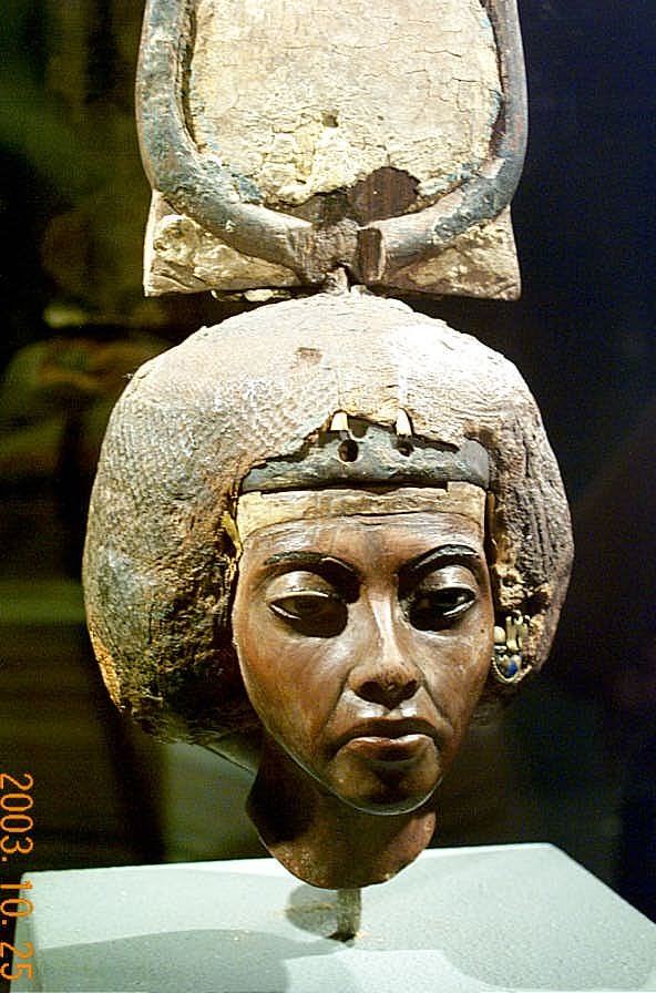 III. Amenhotep fáraó főfelesége, Tije (Berlin, Neues Museum)